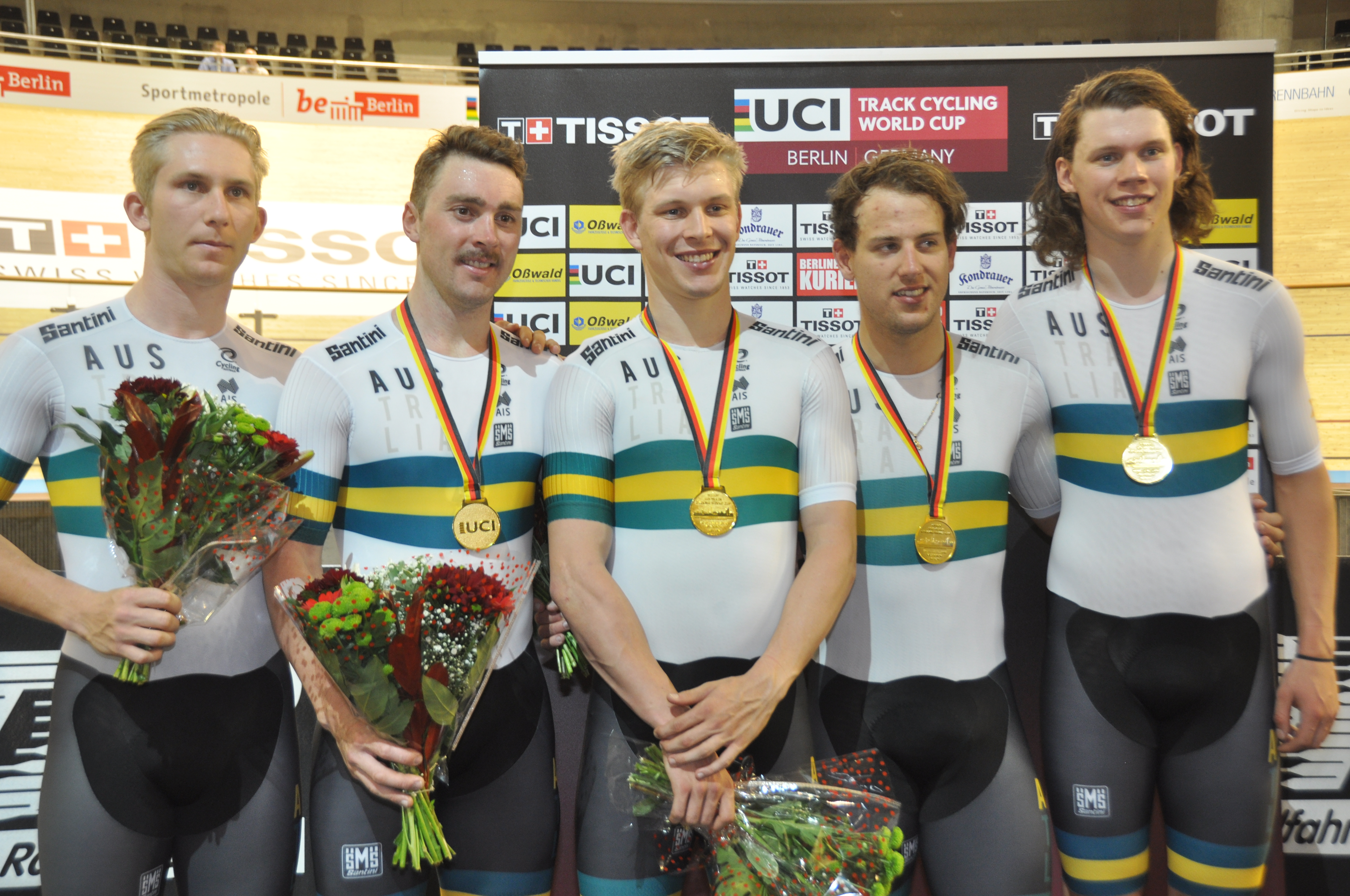 Australischer Bahnvierer, v.l.n.r.: Cameron Scott, Leigh Howard, Alexander Porter, Sam Welsford, Kelland O'Brien